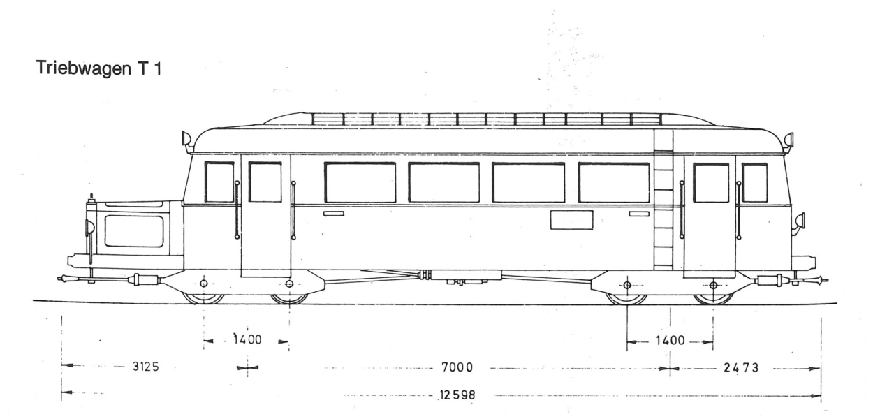 Maßskizze des BTE T1